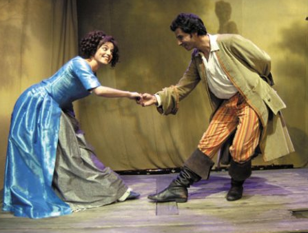 יוסי עיני בהצגה האשליה